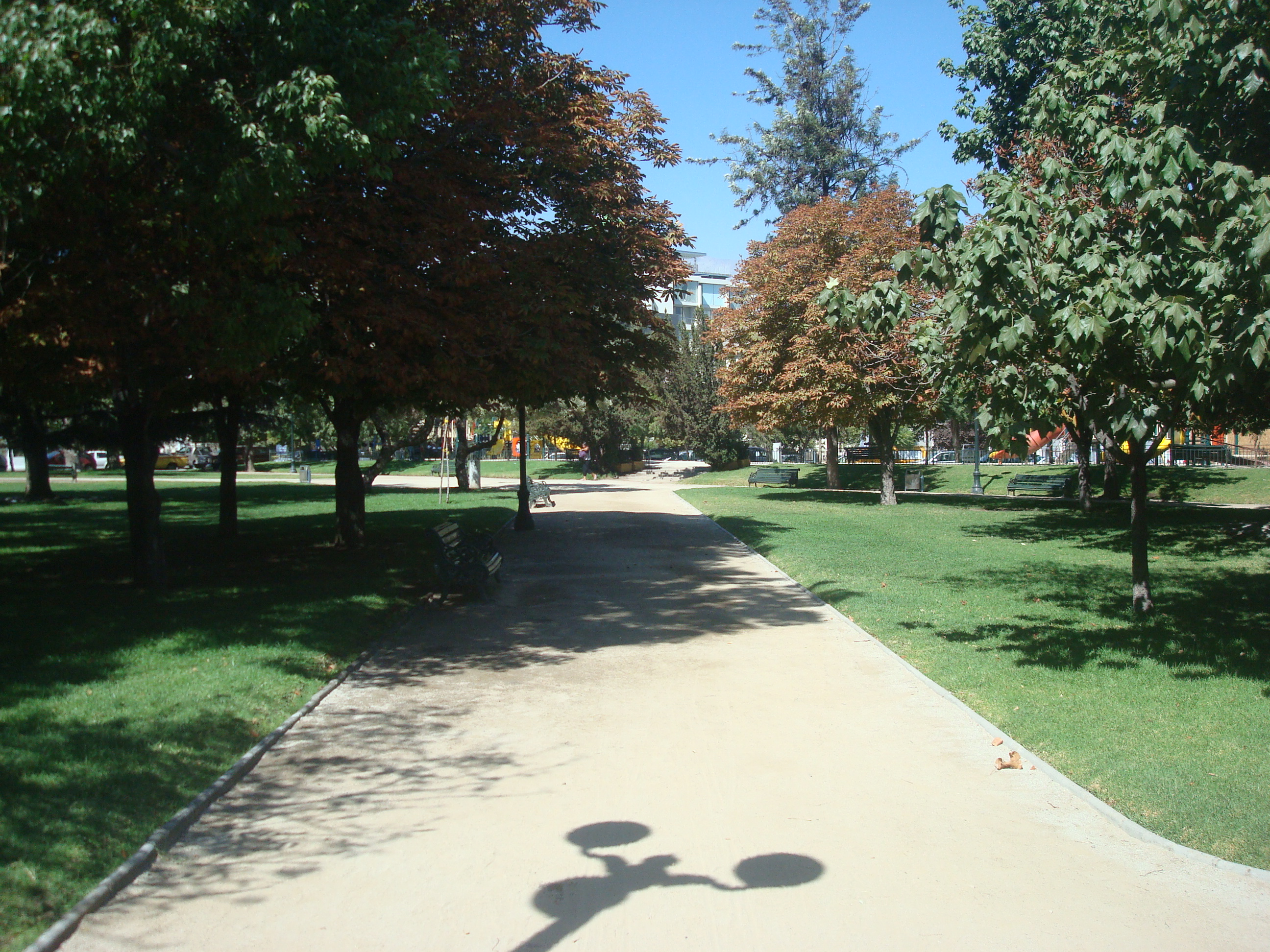 Plaza Las Lilas, Providencia, Santiago de Chile